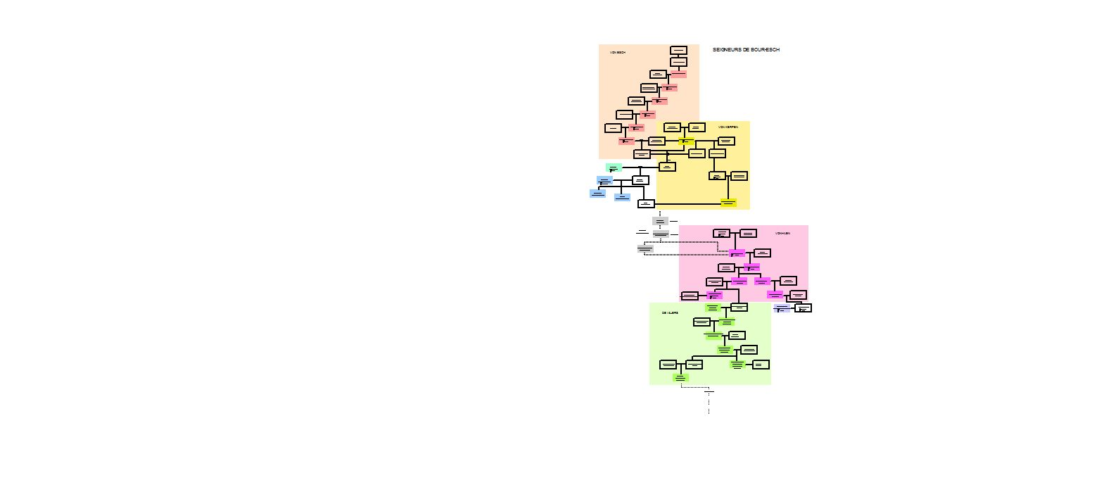 Arborescence des Seigneurs de Bourg Esch